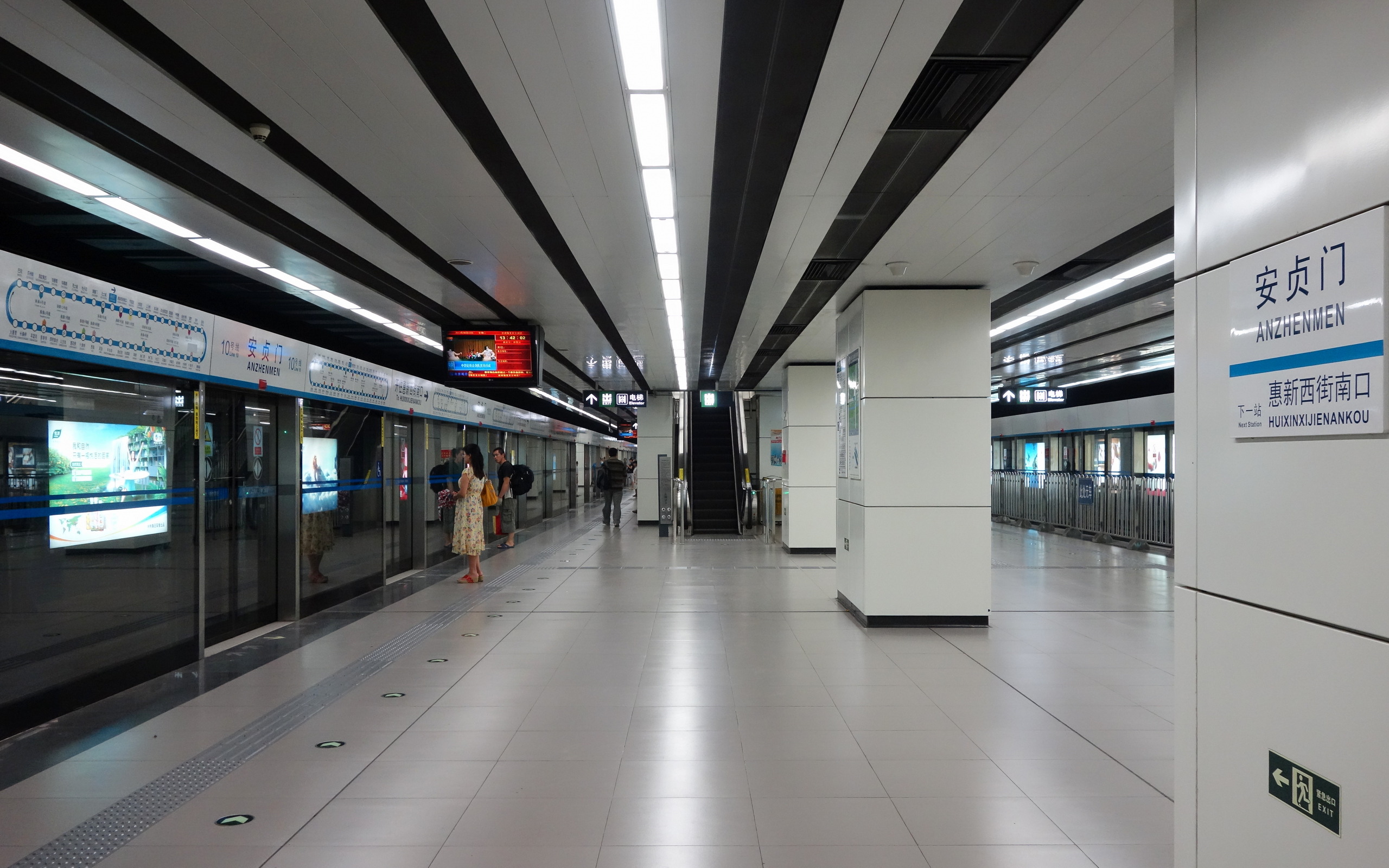 北京地铁10号线安贞门车站站台层南侧岛式站台, 站台另一侧预留轨道未使用.